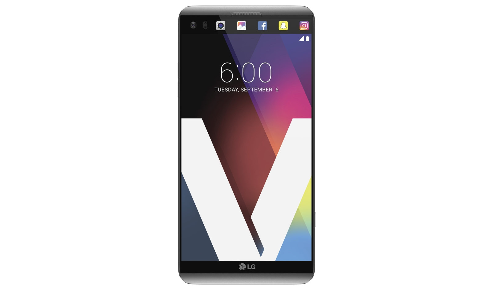 ■ 지난달 28일 출시 후, 하루 평균 2만대 판매 ■ 뛰어난 동영상 촬영기능 앞세워 美 소비자 사로잡아 ■ 배우 ‘조셉 고든 래빗’, 가수 ‘션 멘데스’ 활용 마케팅 활동 강화 ※ Social LG전자 ( 에서 관련 보도자료를 확인하실 수 있습니다.